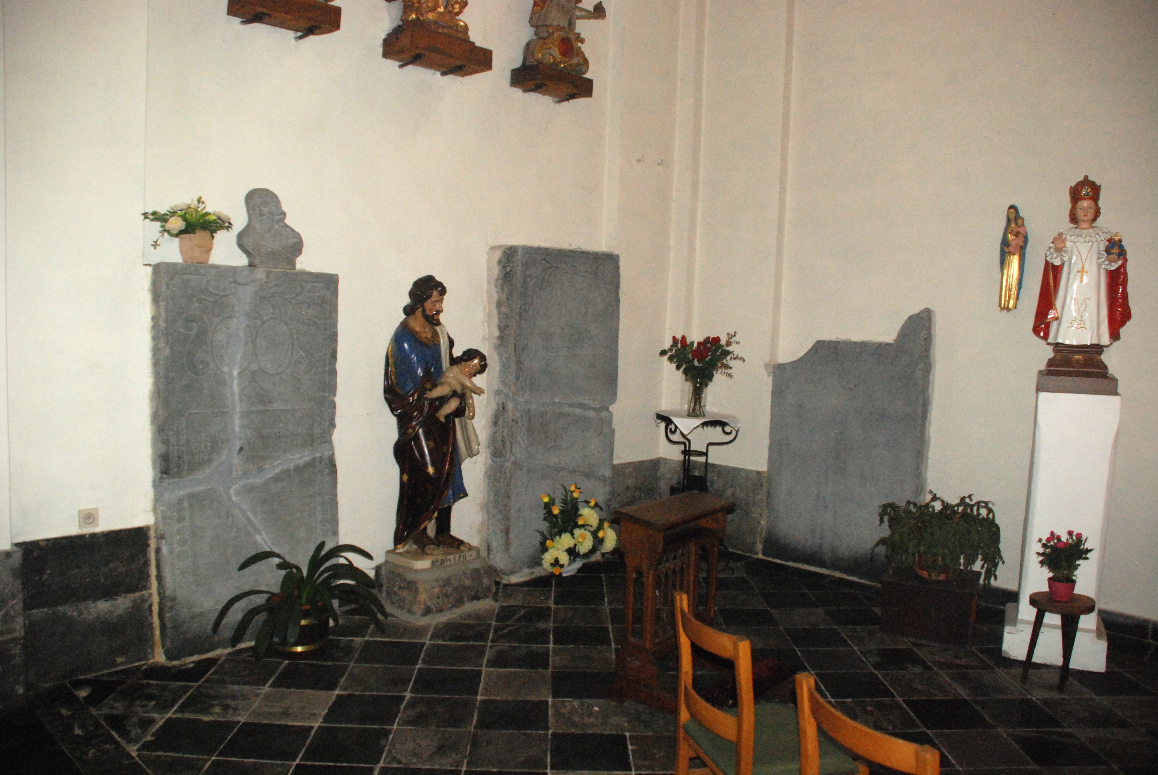 Belgique - Province de Namur - Viroinval - Nismes - église Saint-Lambert (1829)